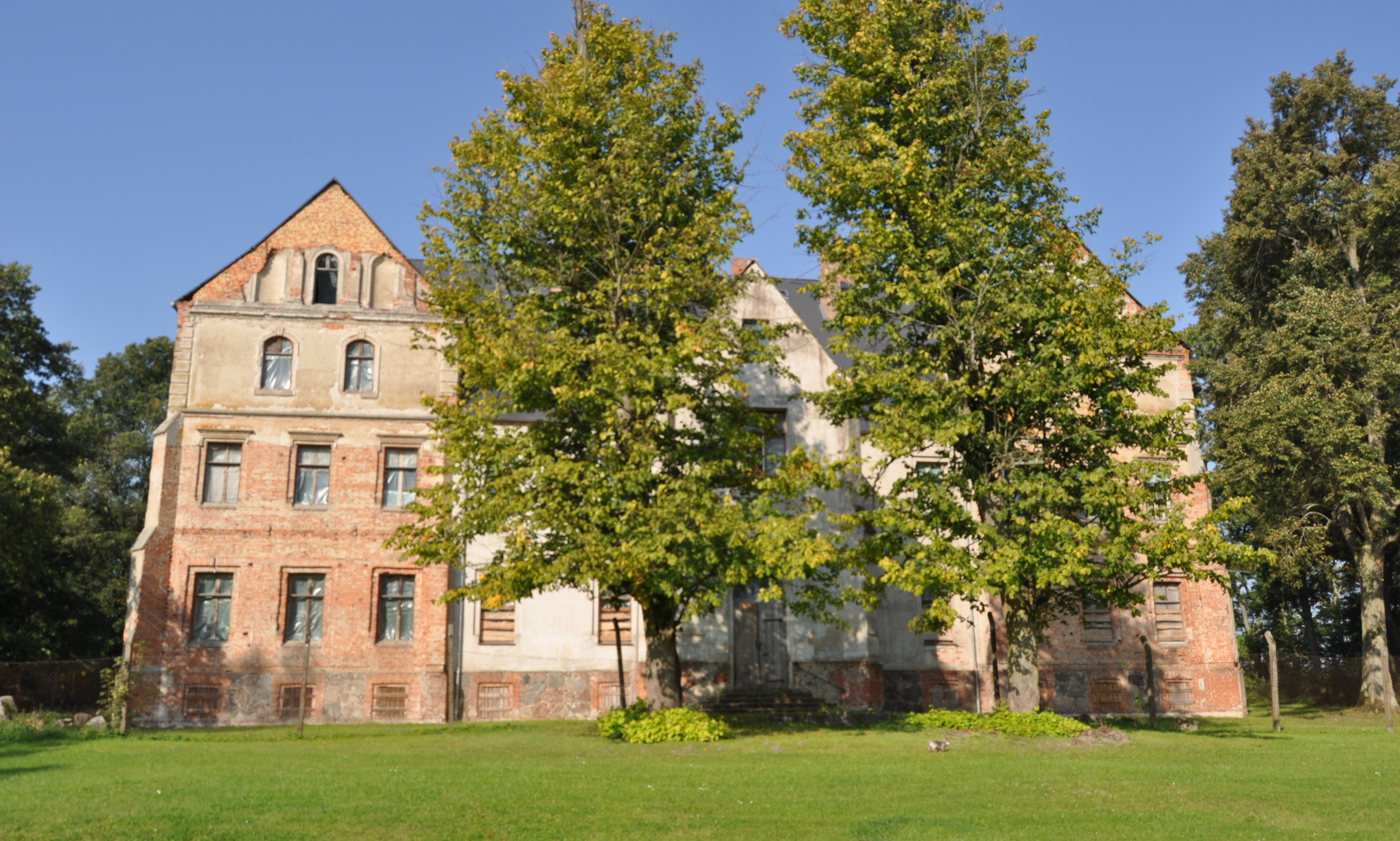 Schloss Lüssow 2014